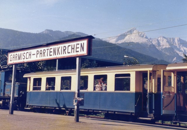 Alpspitze von der Zugspitzbahn in Garmisch-Partenkirchen